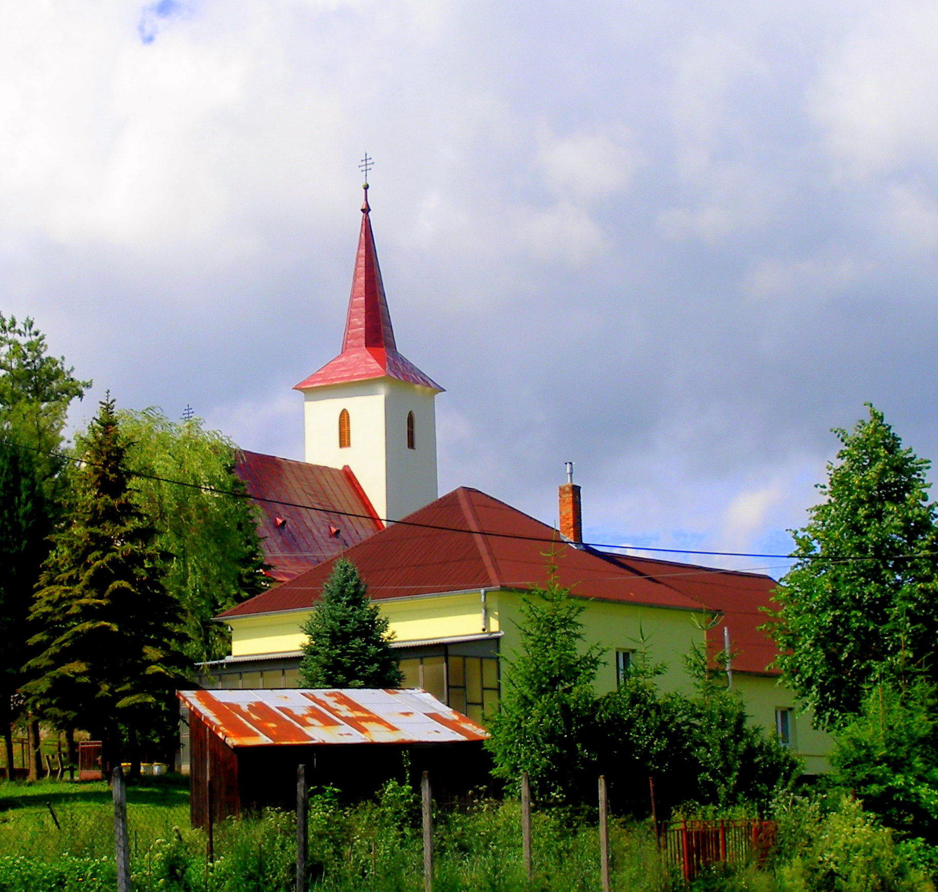 Kostol v obci Ďačov okres Sabinov